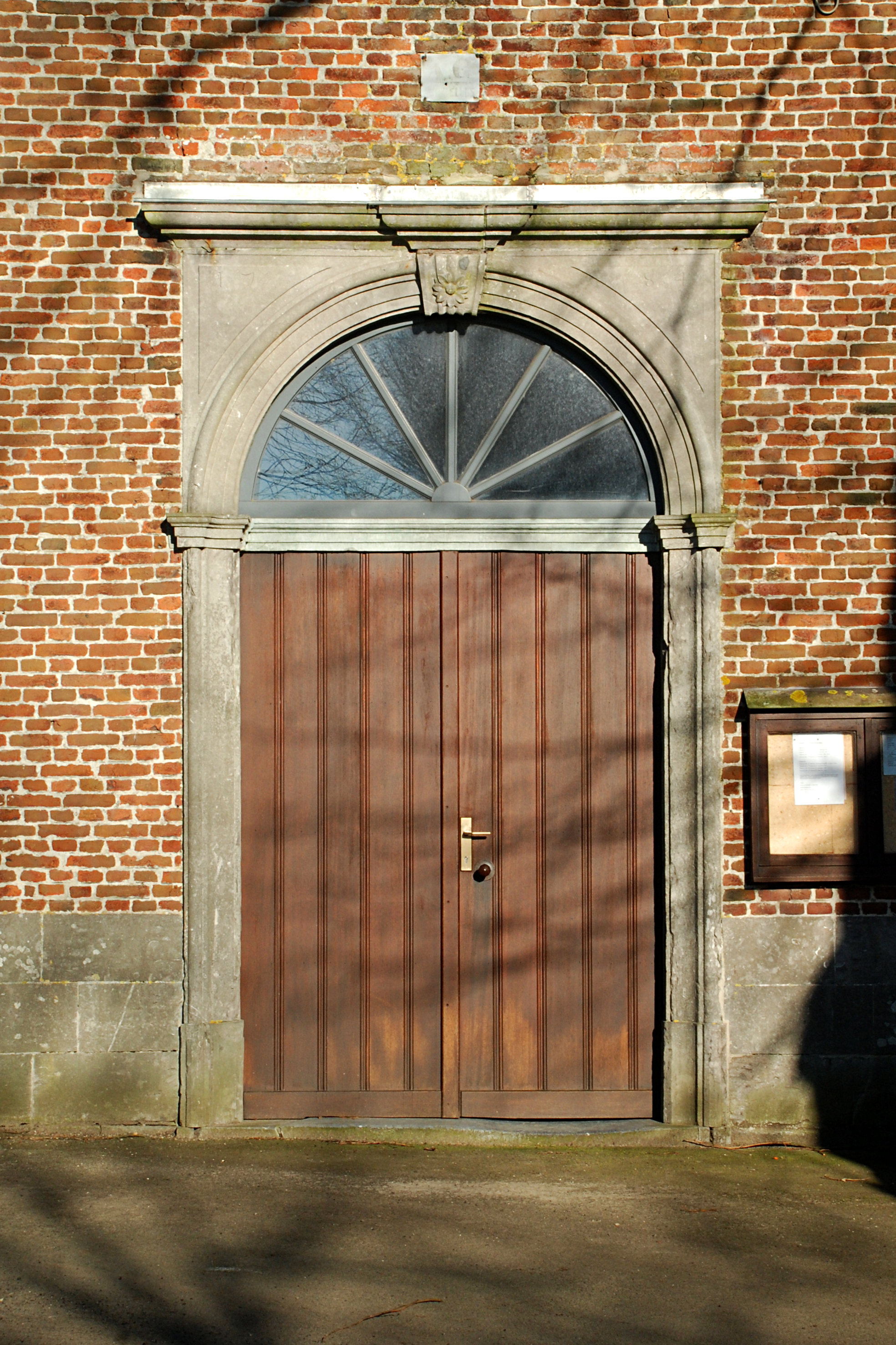 Belgique - Brabant wallon - Chastre - Église Sainte-Gertrude de Gentinnes